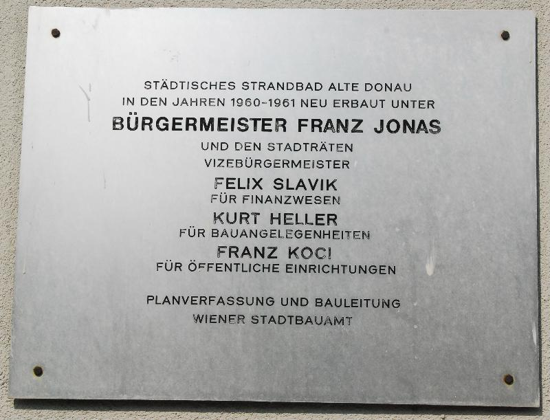 Das Strandbad Alte Donau ist ein städtisches Sommerbad am rechten Ufer der Alten Donau im 22. Wiener Gemeindebezirk Donaustadt.